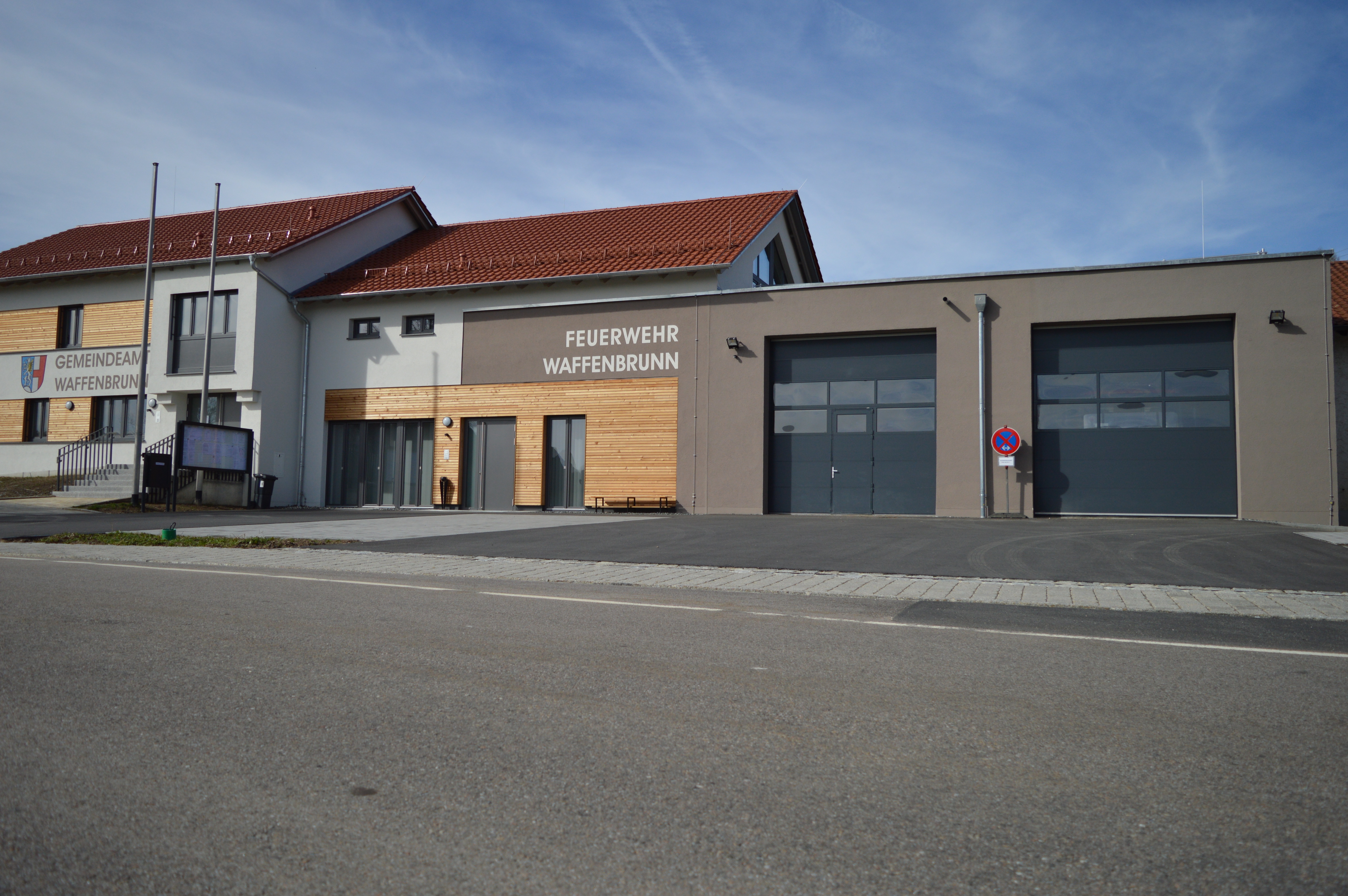 Gemeindeverwaltung mit Feuerwehrgerätehaus 2019